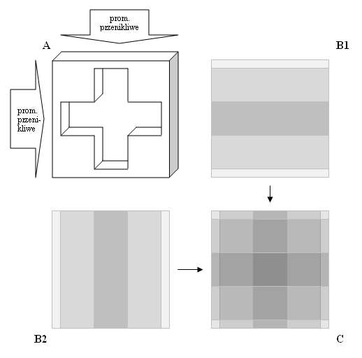 Idea rekonstrukcji tomogramu metodą sumacyjną ("back projection").